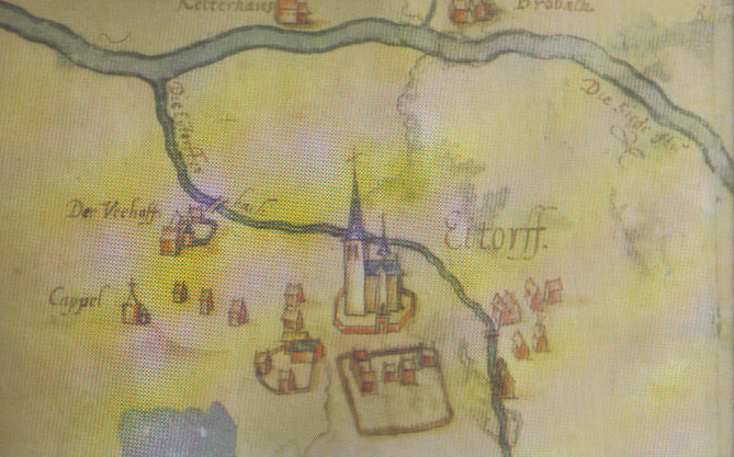 Theil des Bergschen Ambts Windeck sampt anstossende Grentzen, 1607.